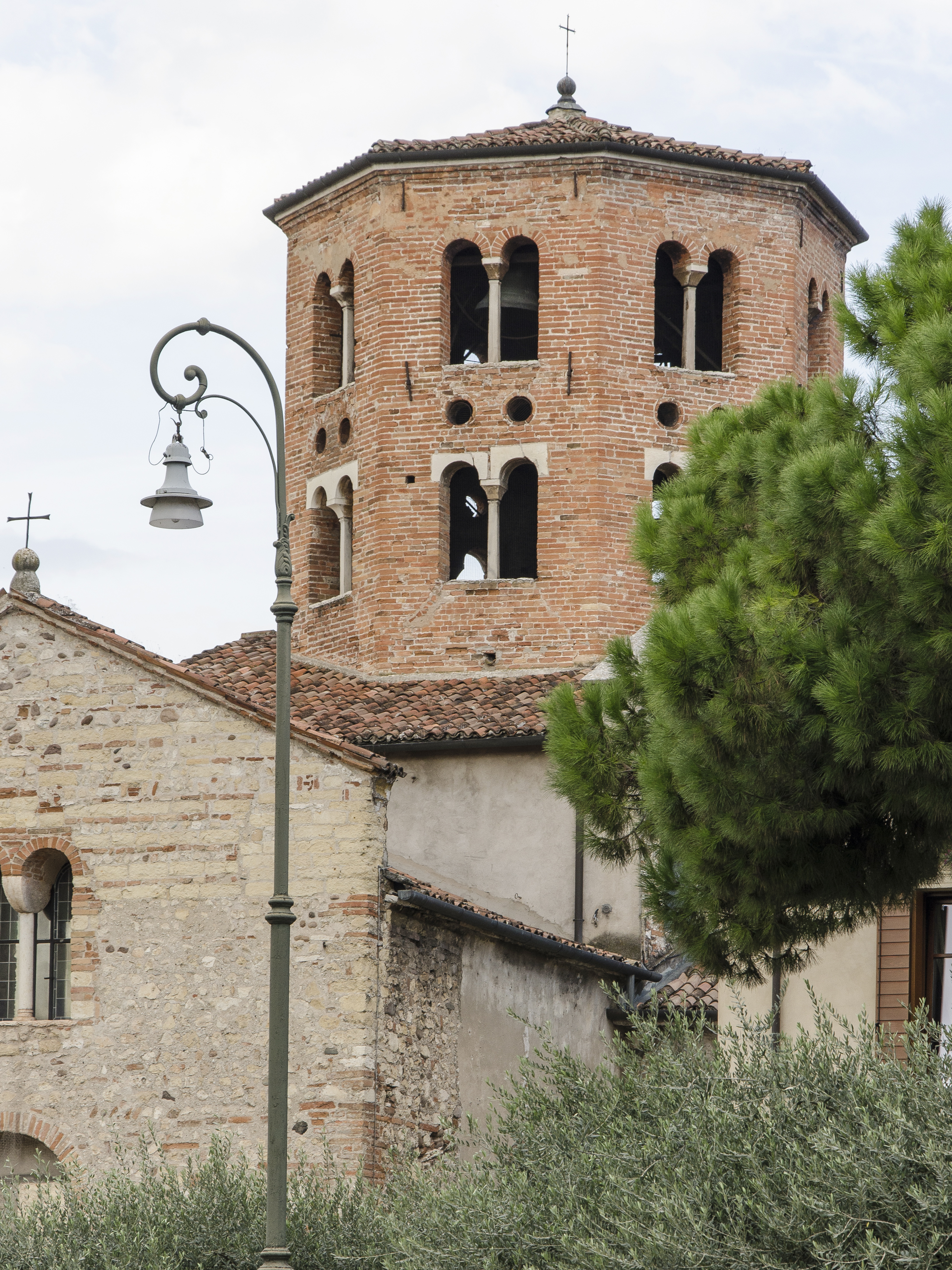 Fotografia del campanile